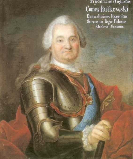 Fryderyk August Rutowski